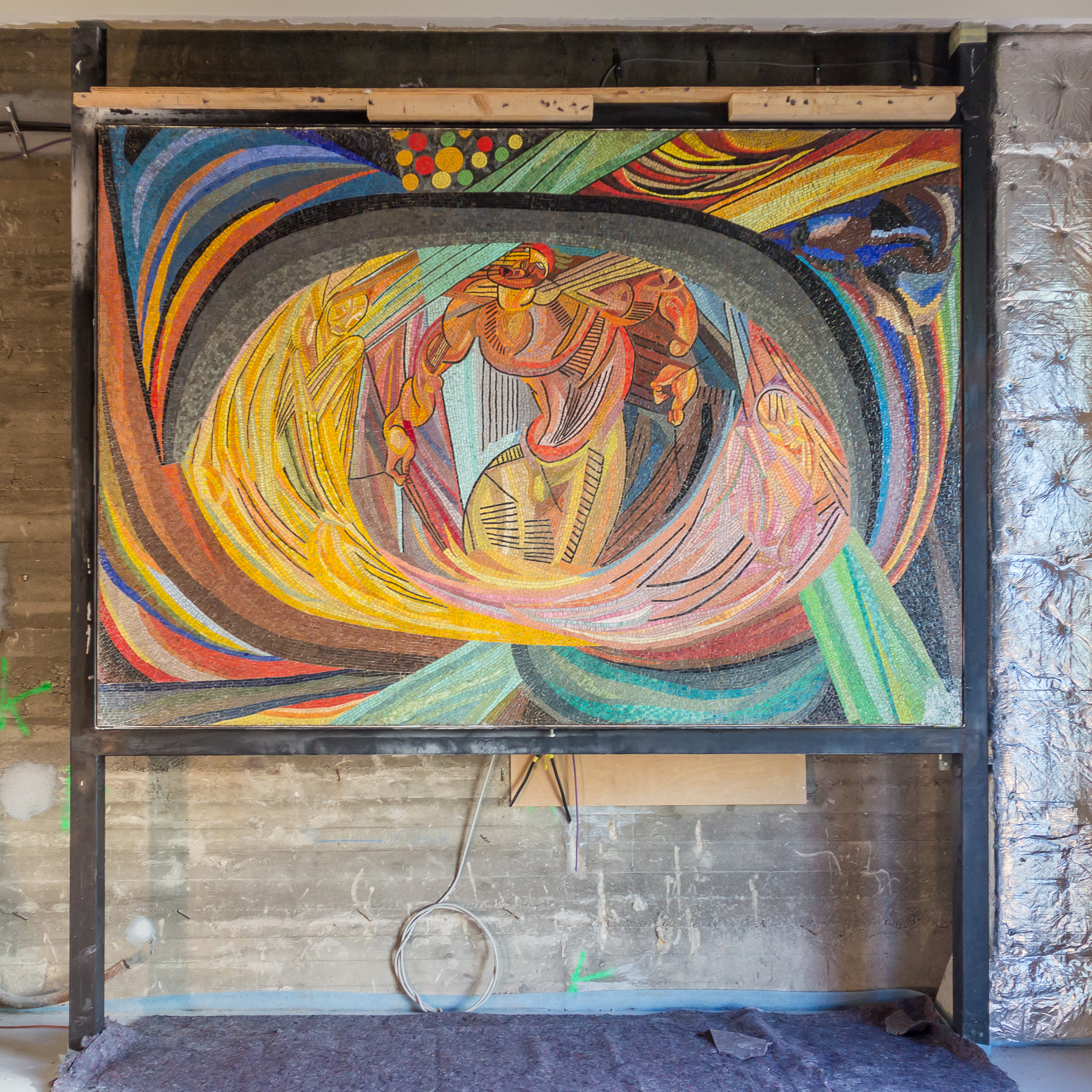 Wiederentdeckung des Otto-Freundlich-Mosaik „Die Geburt des Menschen“